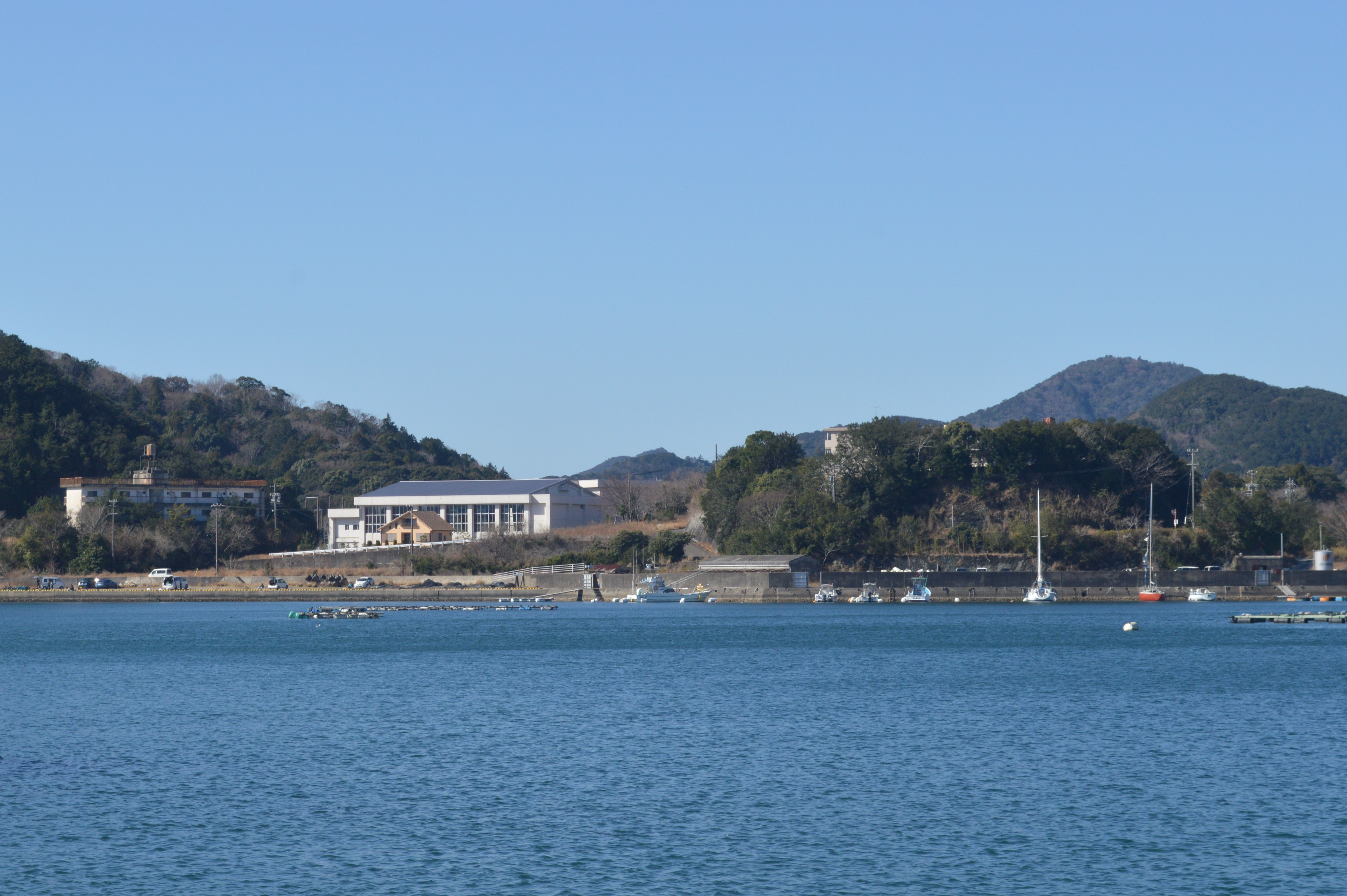 三重県度会郡南伊勢町にある三重県立南伊勢高等学校（三重県立南伊勢高校）南勢校舎。